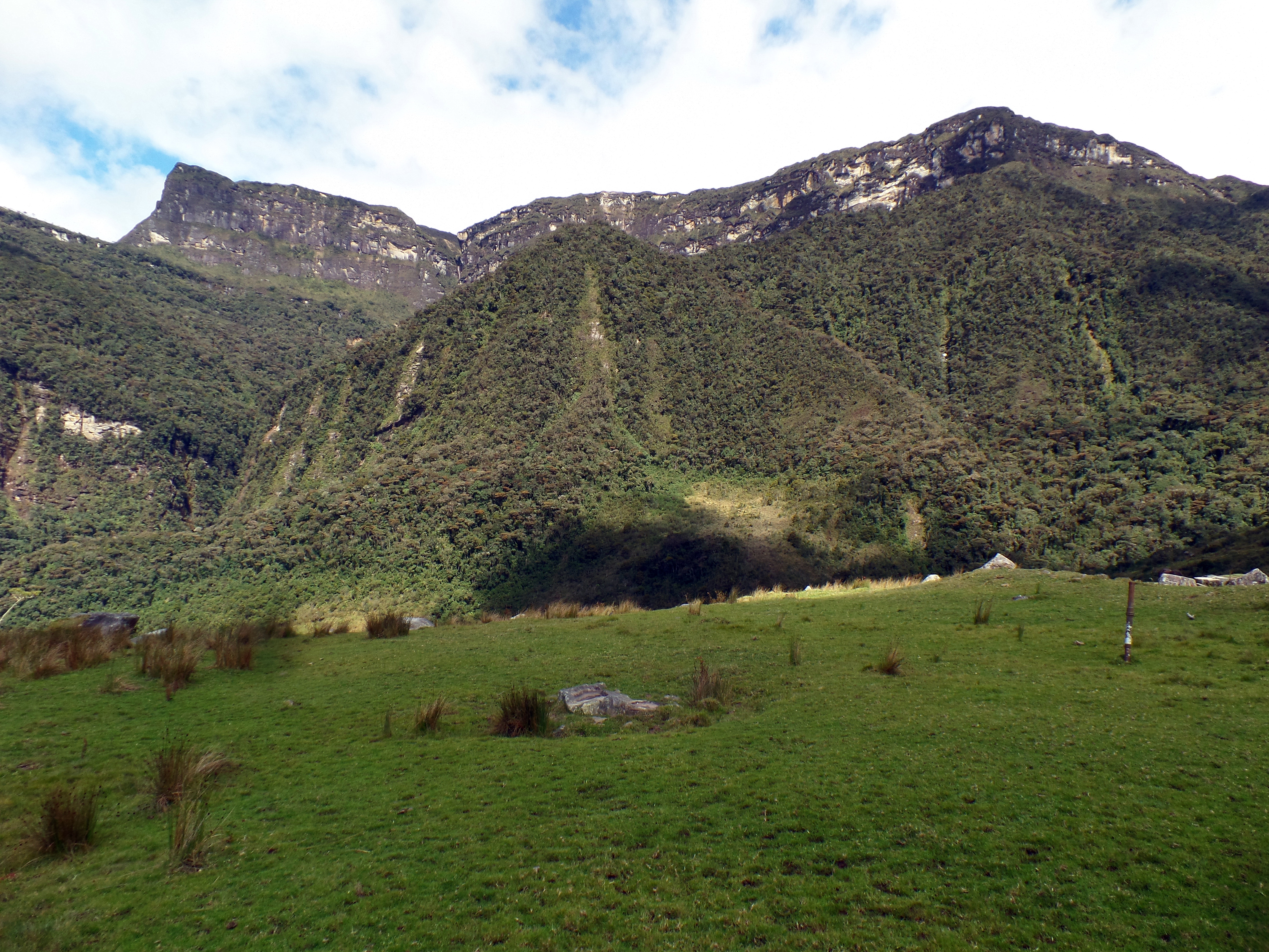 Parque nacional El Tamá